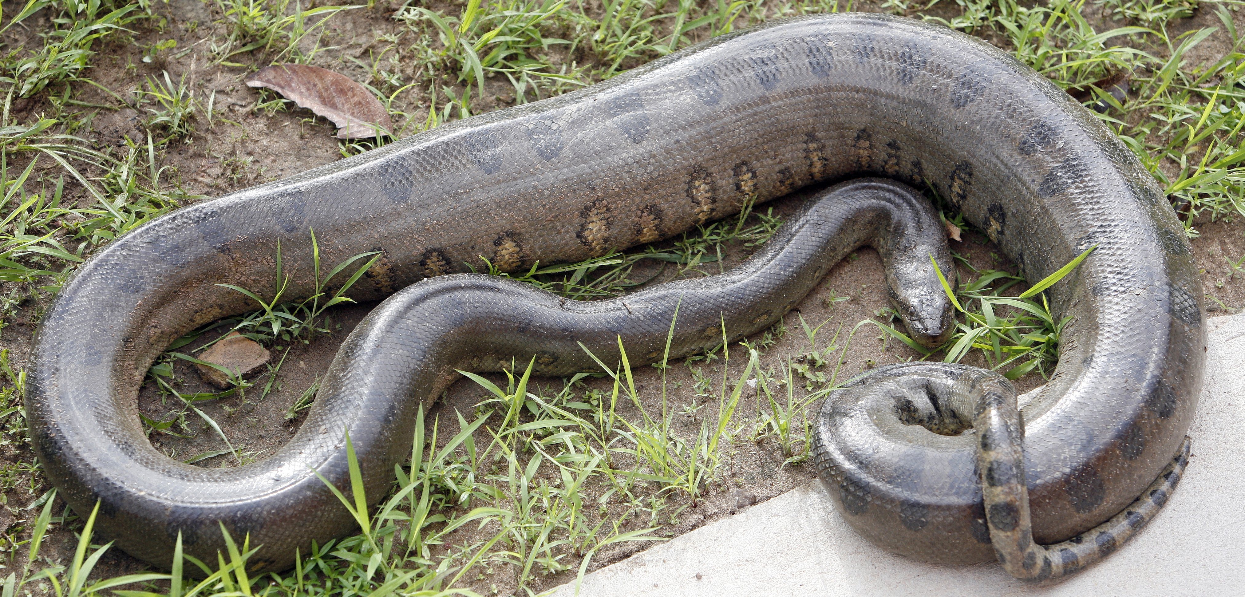 Große Anakonda von 3 Metern, gefunden auf dem Campus der Universidade Federal do Pará (Föderative Universität von Pará).